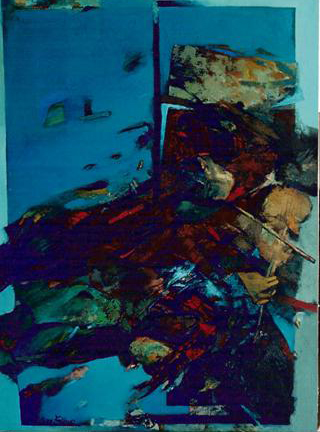 "Uliczny Koncert", olej na płótnie 100x130